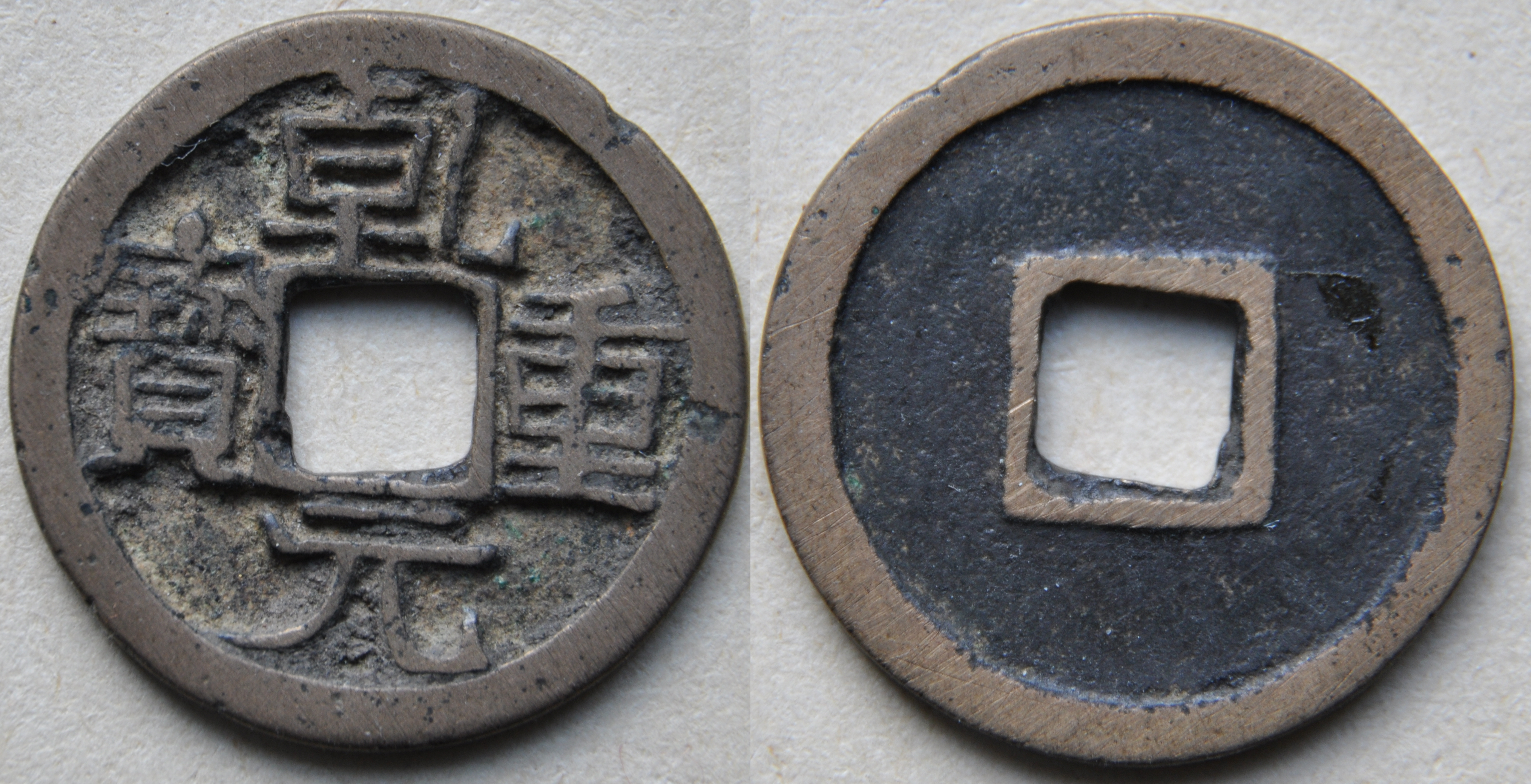 S407 : A/ Qian Yuan zhongbao R/ vide Dimension : 24.5 mm Poids 3.95 g. Bronze Type III Règne de Suzong (756-763) Dynastie des Tang